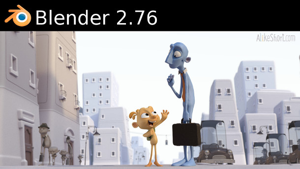 Blender 2.76